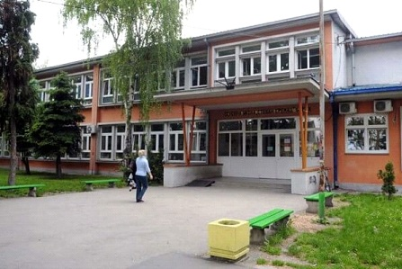 Школа Борча Стеван сремац